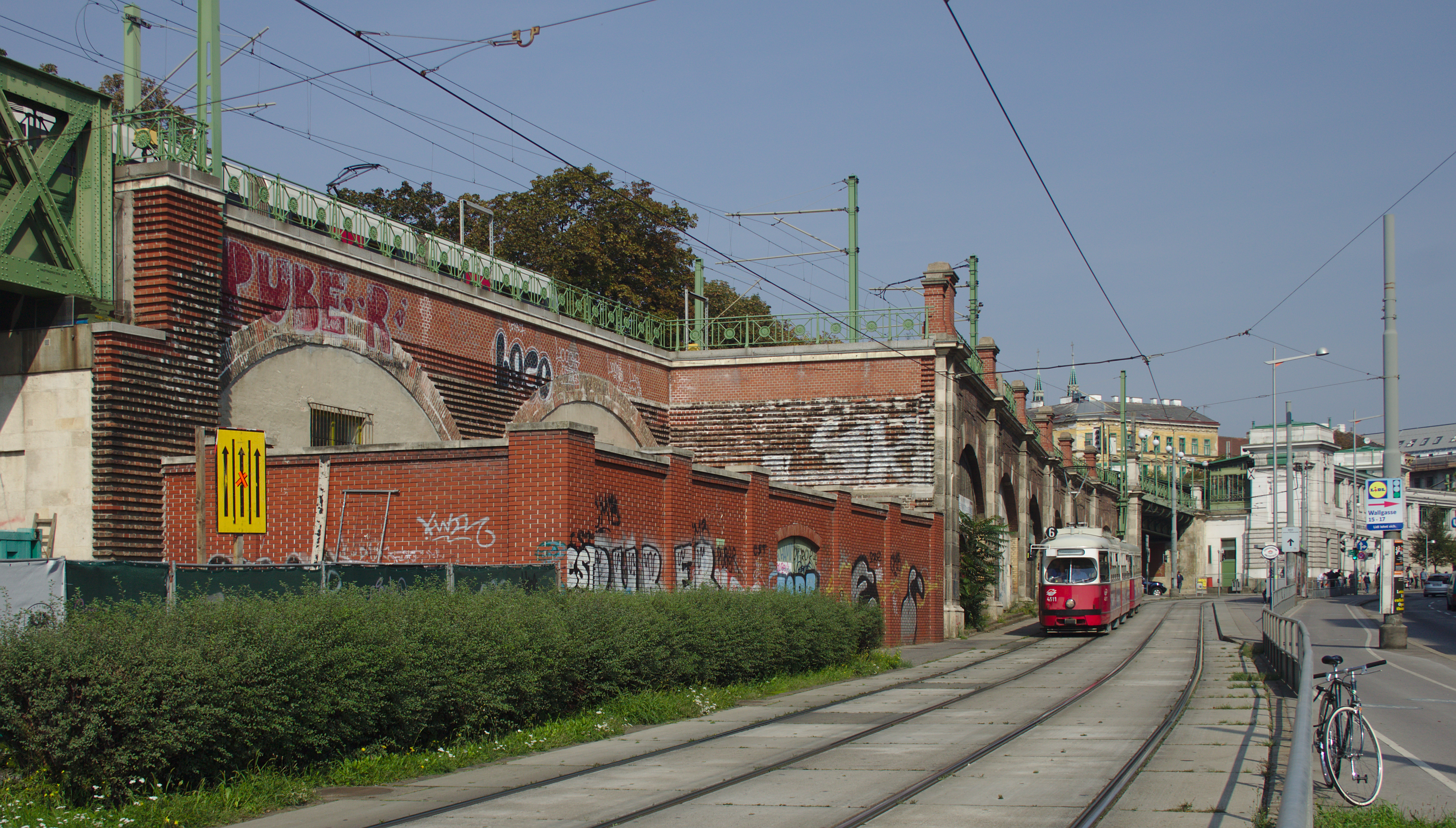 ehem. Stadtbahn – Teilbereich der heutigen U6 Südlich der Station Gumpendorfer Straße sollte eine Abzweigung der Stadtbahn (die Maueransätze sind in der Bildmitte heute noch sichtbar) über den Gaudenzdorfer Gürtel zum Bahnhof Matzleinsdorf der Südbahn führen, von dort eventuell über den Laaer Berg bis zur Ostbahn. Da die Hochbauten der wichtigeren Strecken auf Grund der von Otto Wagner geforderten architektonischen Qualität wesentlich teurer geraten waren als geplant, blieb dieser Streckenteil zwecks Einsparung ungebaut.